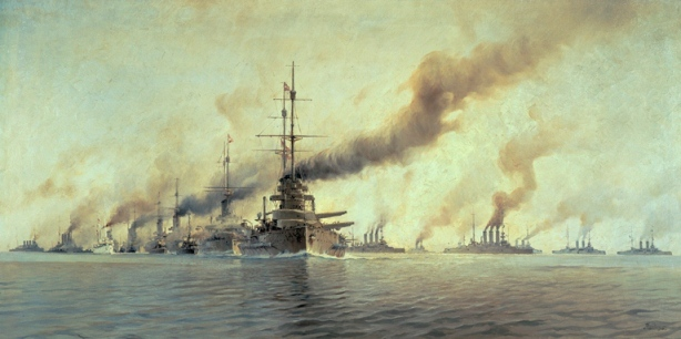 Gemälde der SMS Viribus Unitis an der Spitze des 1. k.u.k. Schlachtschiffgeschwaders in der Adria.